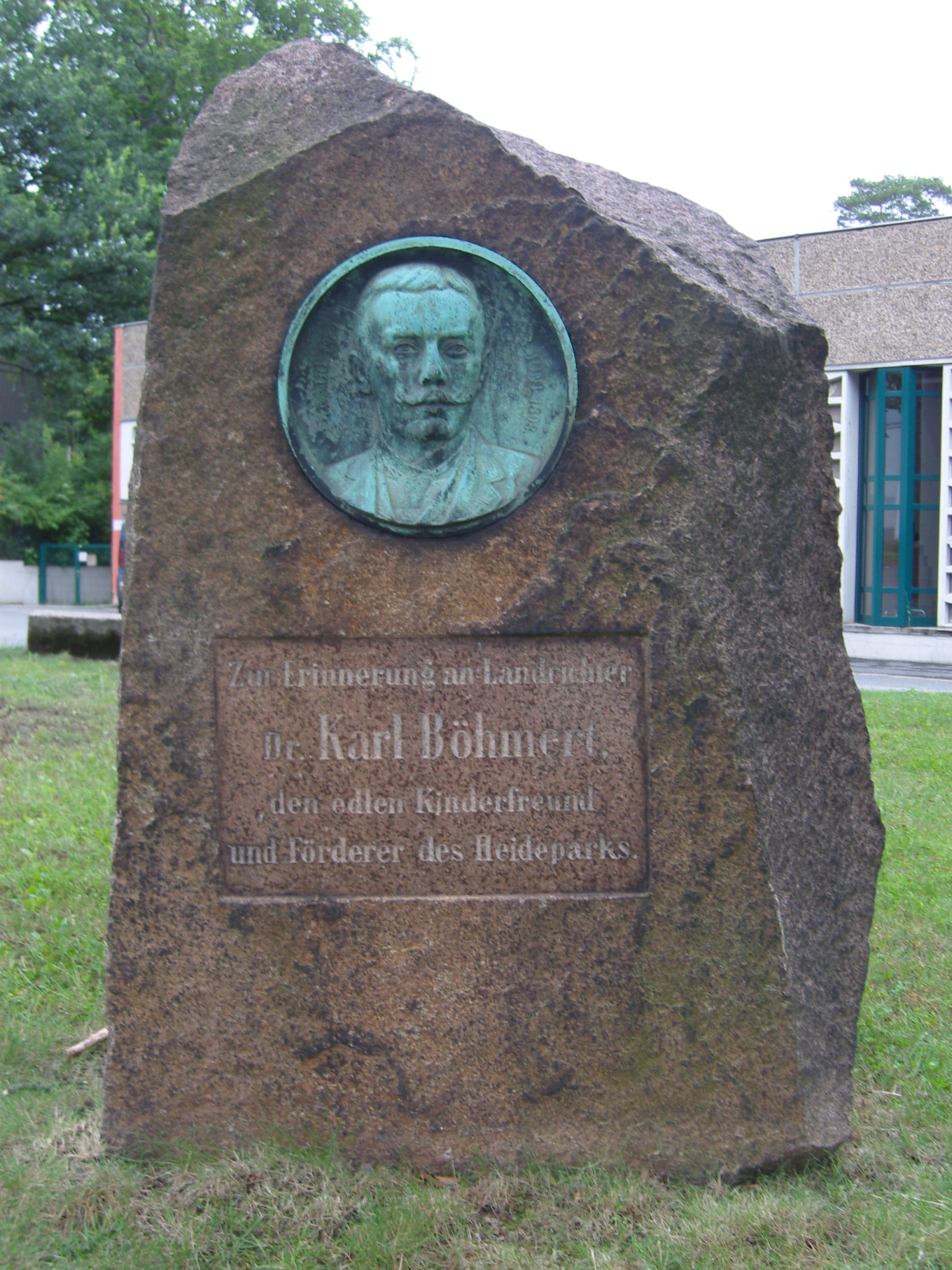 Gedenkstein für Karl Viktor Böhmert an der Fischhausstraße in Dresden vor der Körperbehinderten-Schule; aufgestellt in Jahr 1899